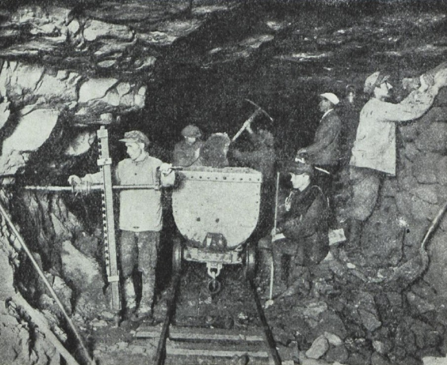 Töö maa-aluses kaevanduses